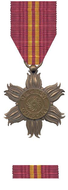 Eigen tekening